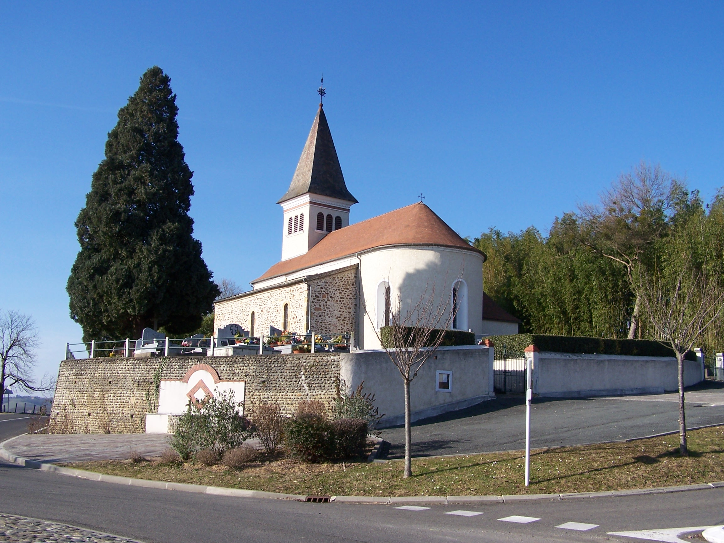 Église d'Urdès (communauté de communes de Lacq, Pyrénées-Atlantiques)